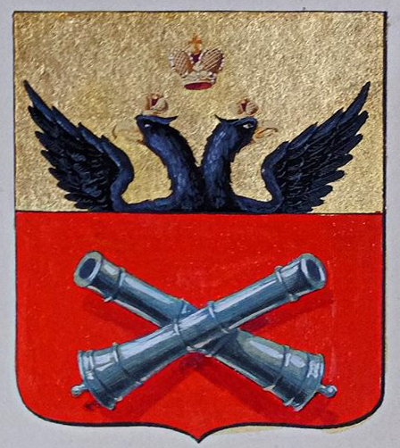 Беларуская (тарашкевіца): Быхаў (Bychaŭ). Герб места